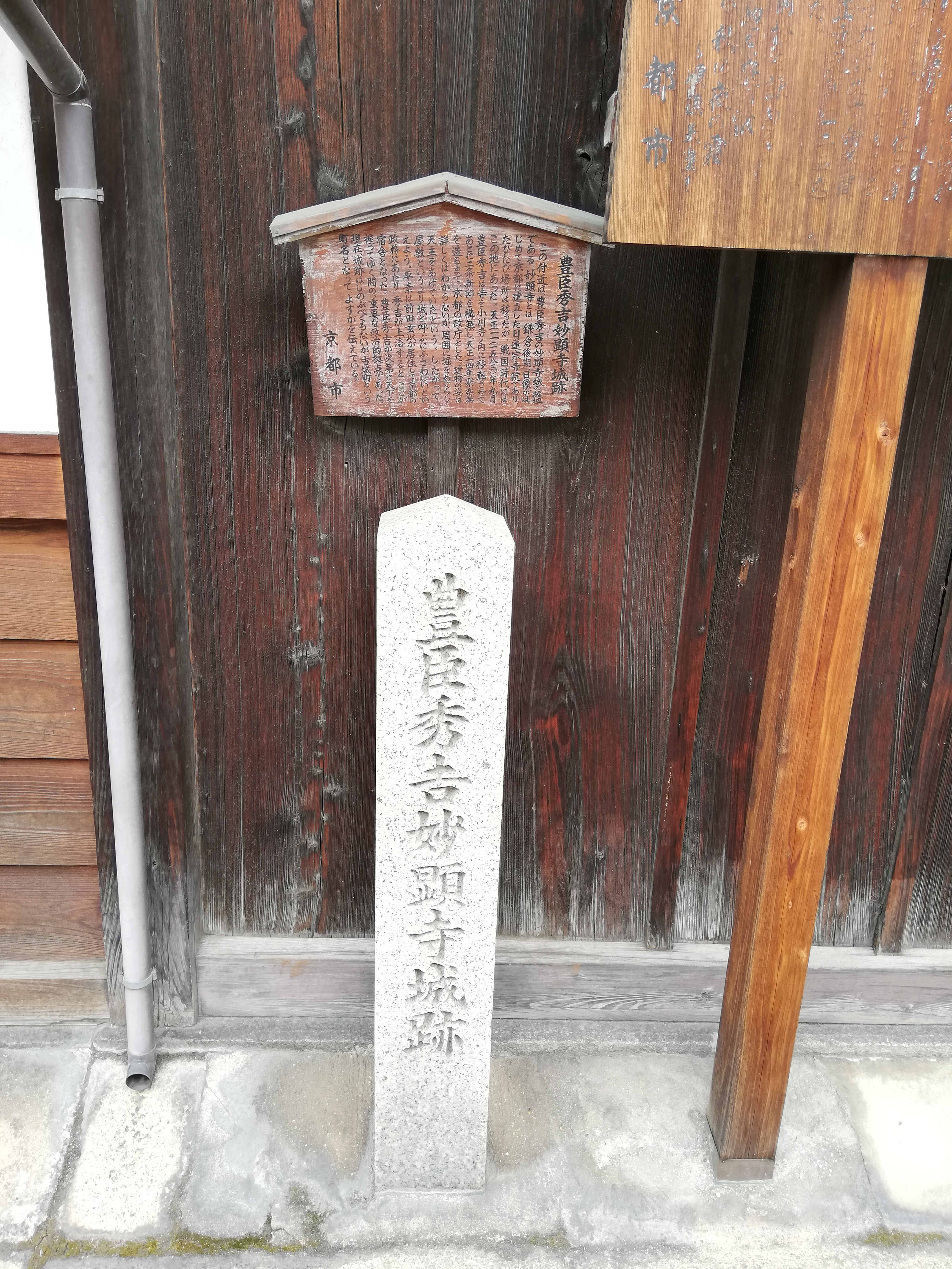 豊臣秀吉が建てた妙顕寺城の跡を示す石碑。